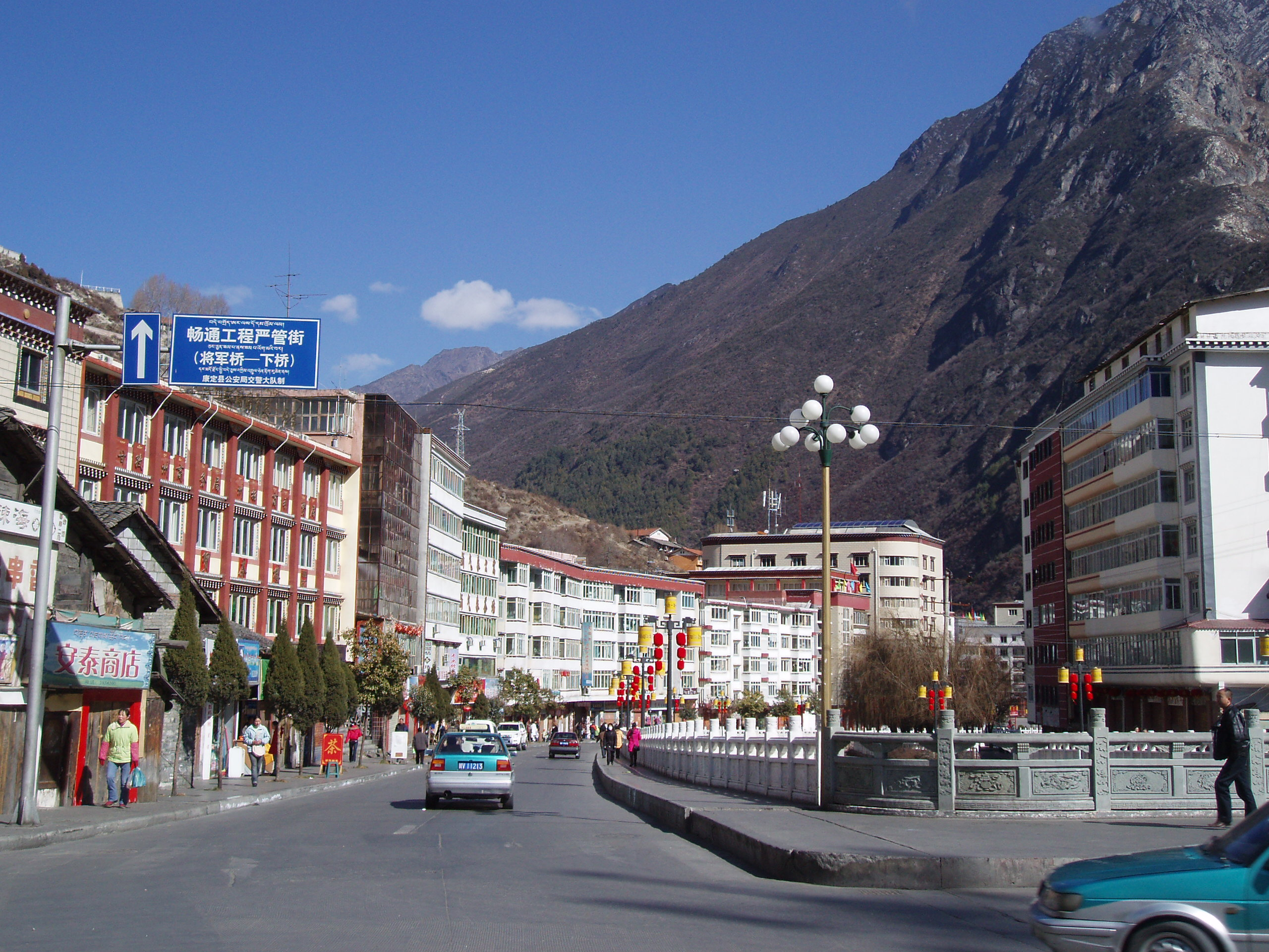 Via principale di Kangding